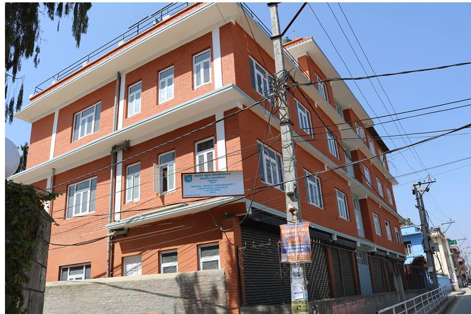 नेपाली: नेपाल खुला विश्वविद्यालय भवन